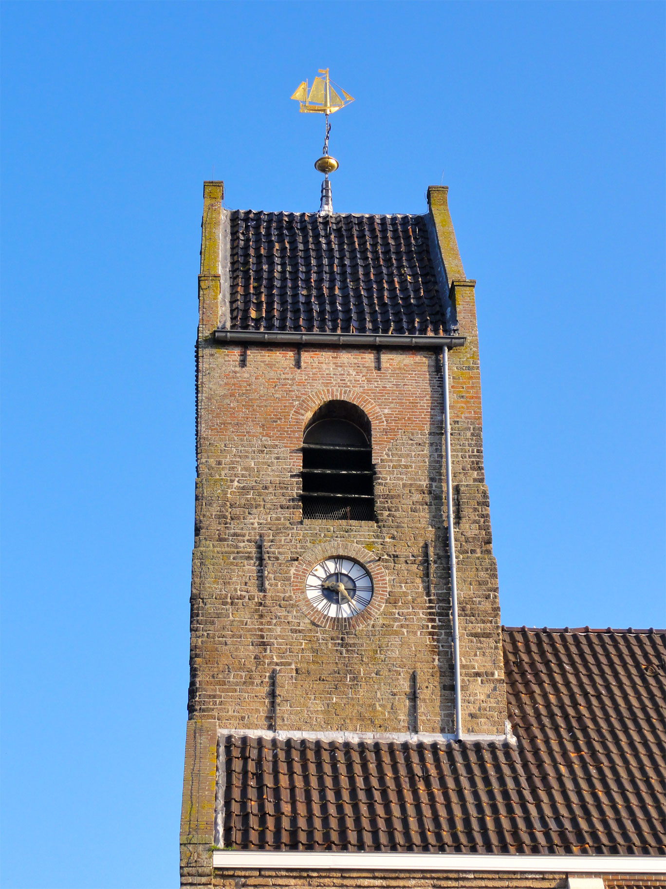 Toren van de Mariakerk aan het Tsjerkeplein 4 in Wierum